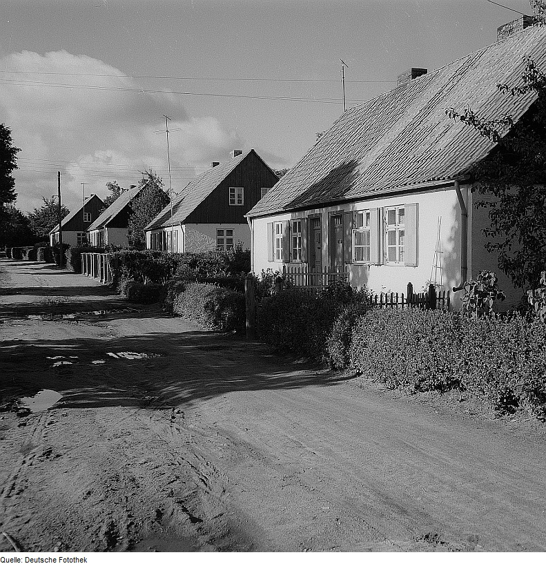 Original image description from the Deutsche Fotothek Sellin-Moritzdorf. Blick entlang einer Straße